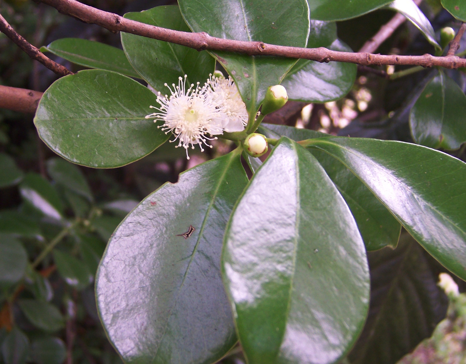 goyavier-fraise (Psidium cattleyanum) - flowers Photo: B.navez - 24 FEB 2006 - Réunion island